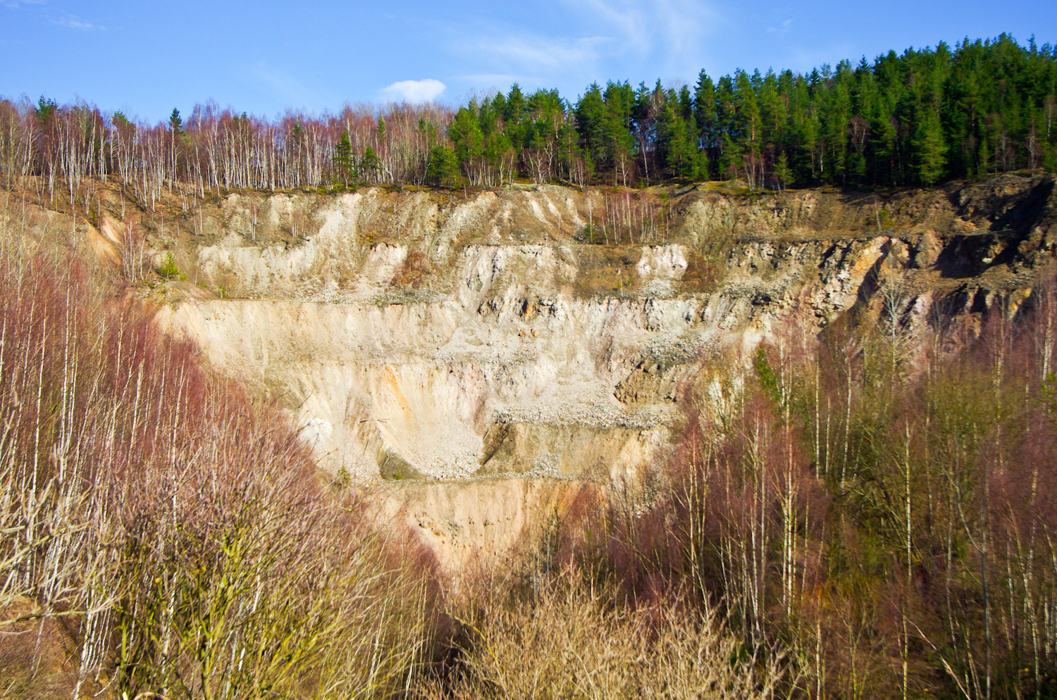 Krásno Hubský peň, dolování cínowolframové rudy